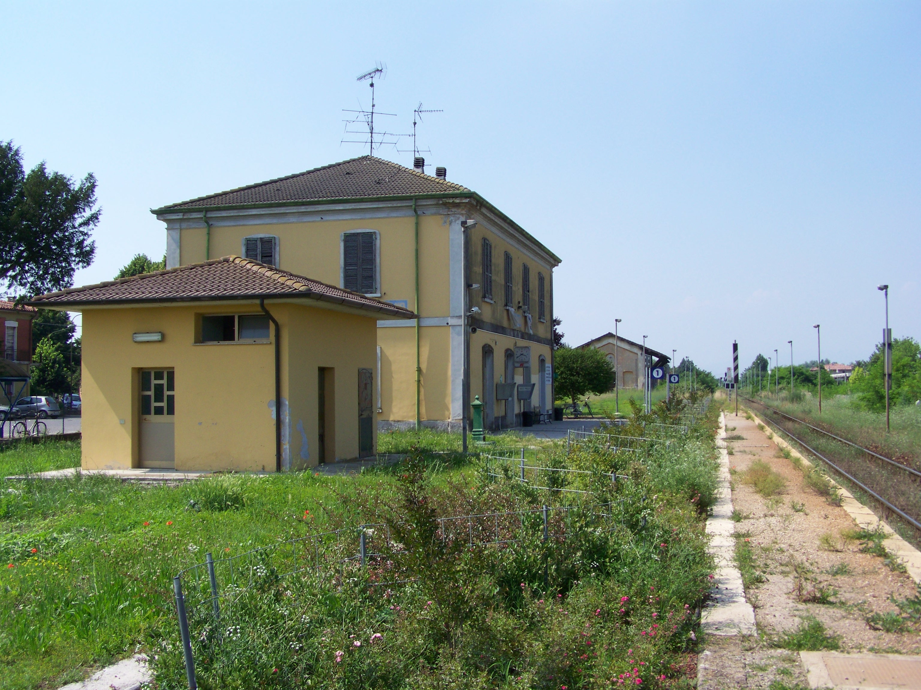 Stazione di Calvisano. Panoramica dei fabbricati e del piazzale binari.